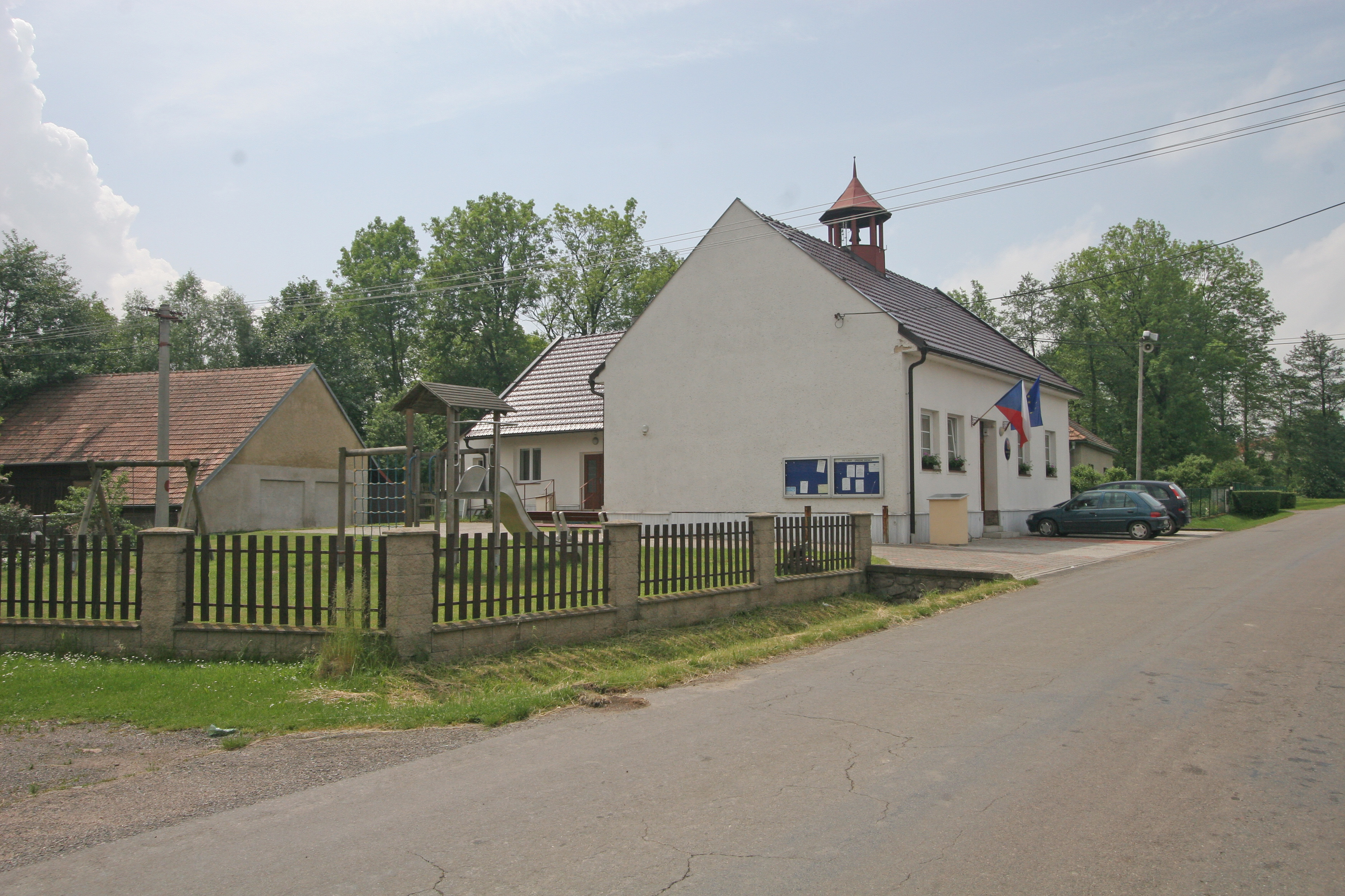 Lány obecní úřad